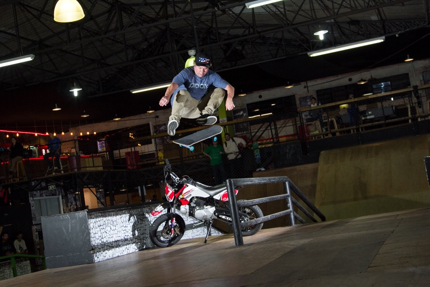 Pulando a Tr